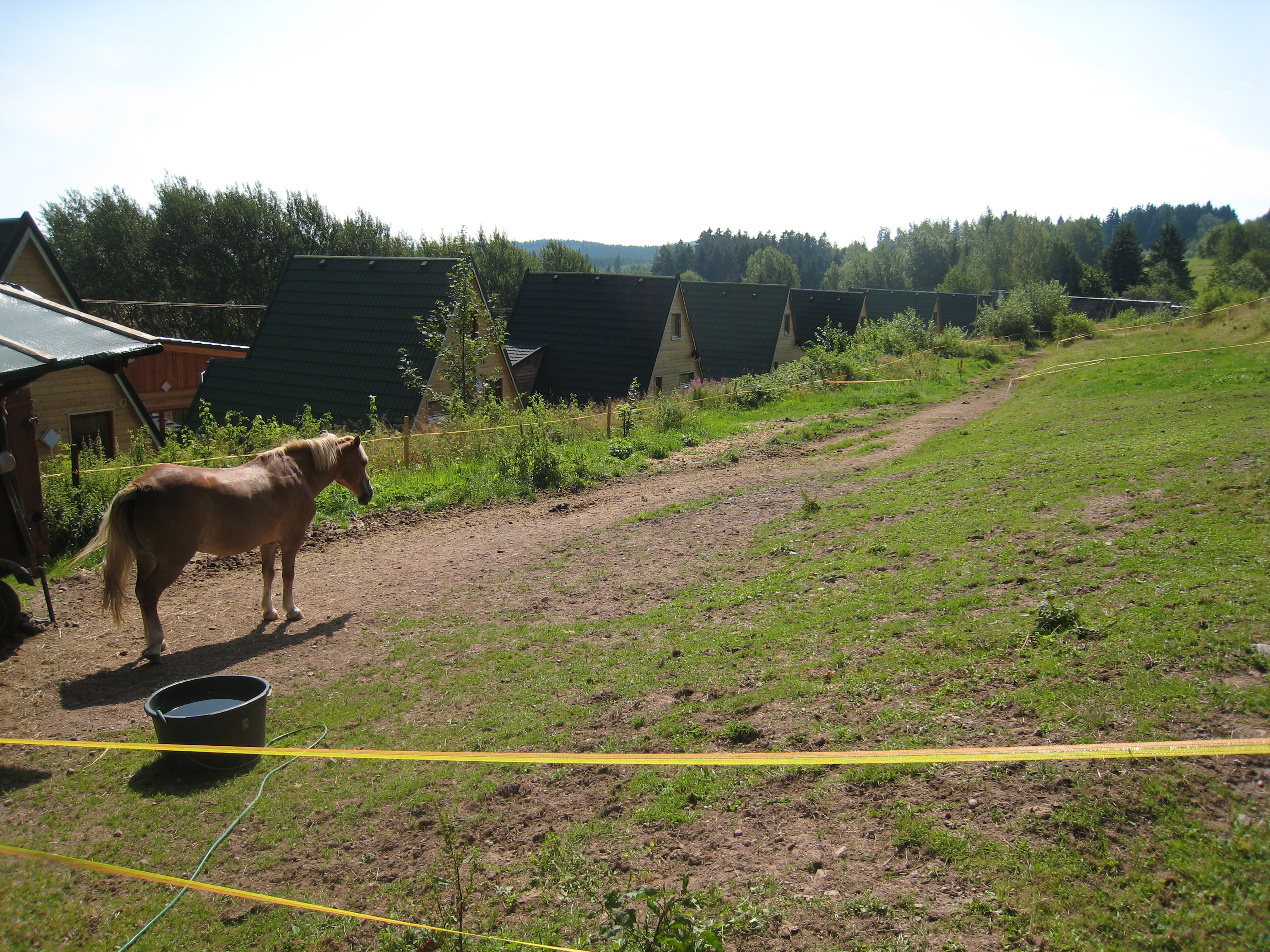 Event- und Tagungszentrum Miavojo in Oehrenstock, Langewiesen.